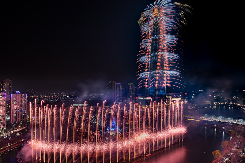 Inauguration de la Lotte World Tower, Groupe F, 2017